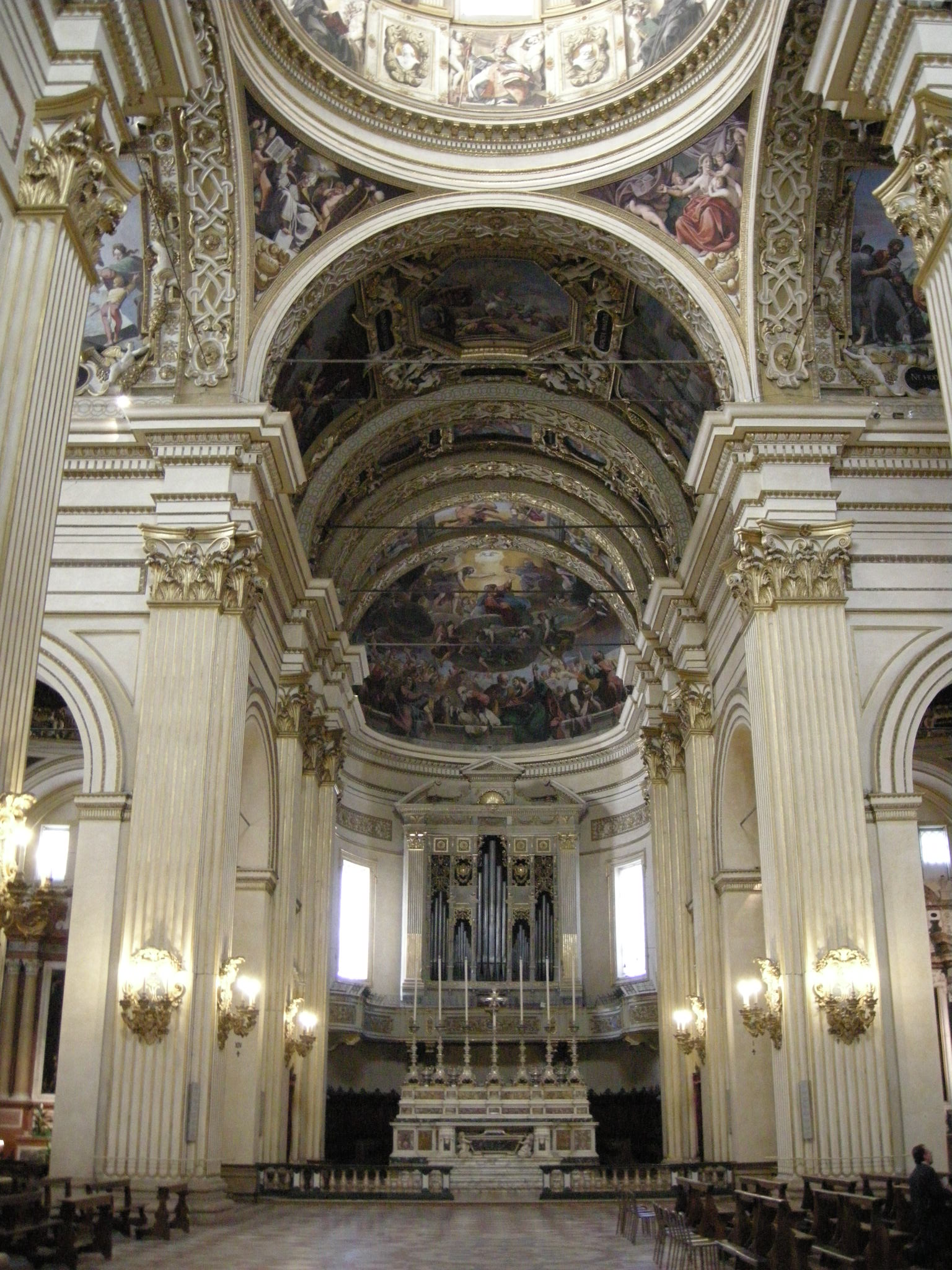 Madonna della Ghiara, interno